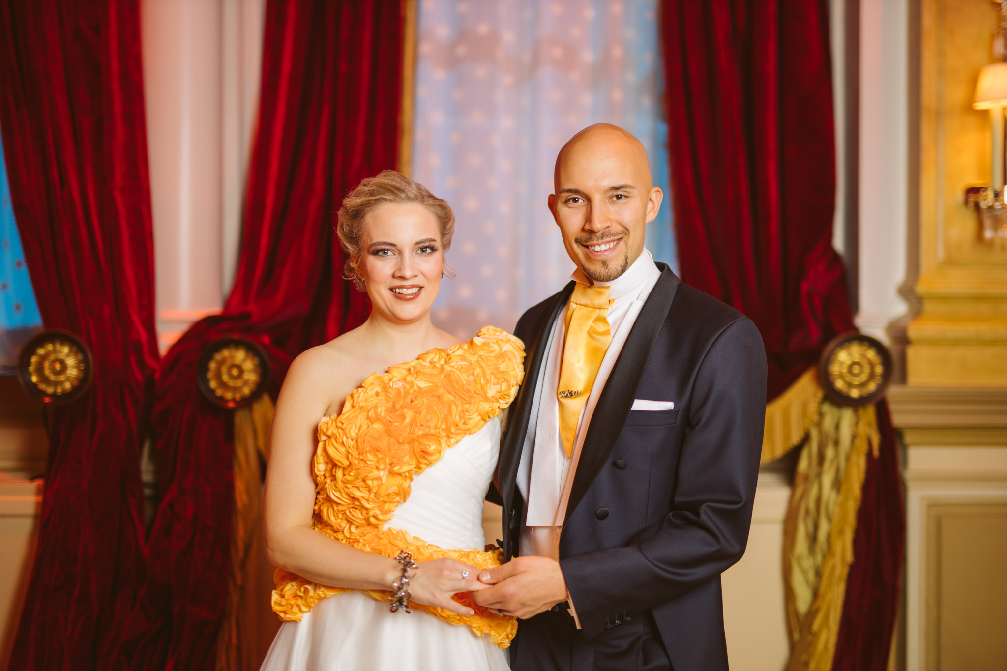 Saana Tyni ja Henri Haho Linnan juhlissa